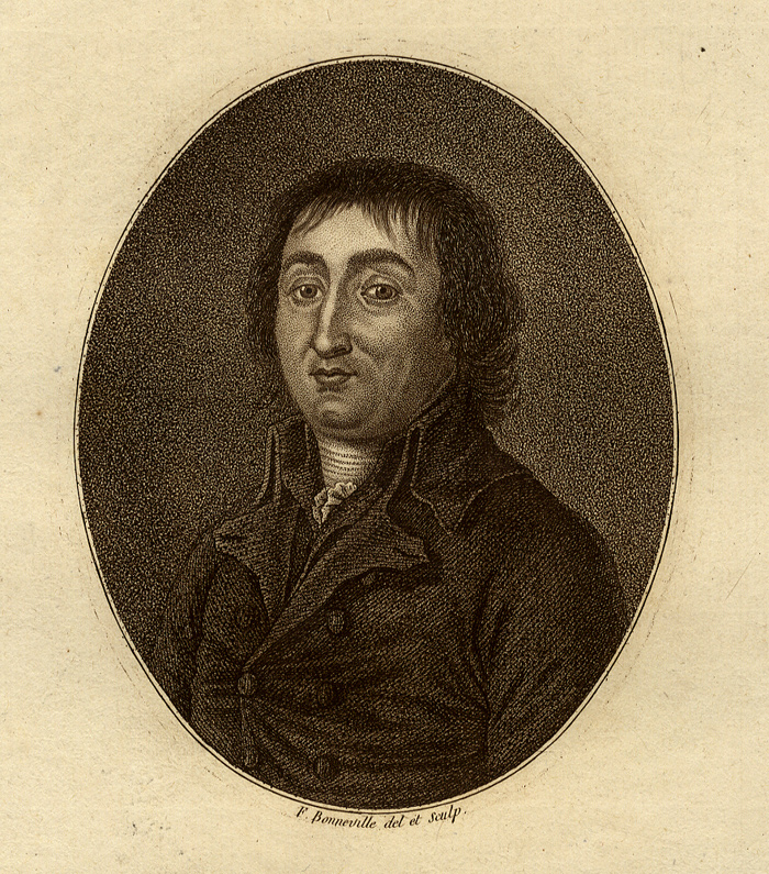 "Pierre Joseph Cambon. Député du département de l'Hérault à l'Assemblée nationale".Estampe, eau forte au pointillé.